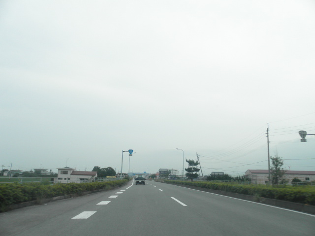 徳島県阿南市那賀川町色ケ島野上 国道55号阿南道路